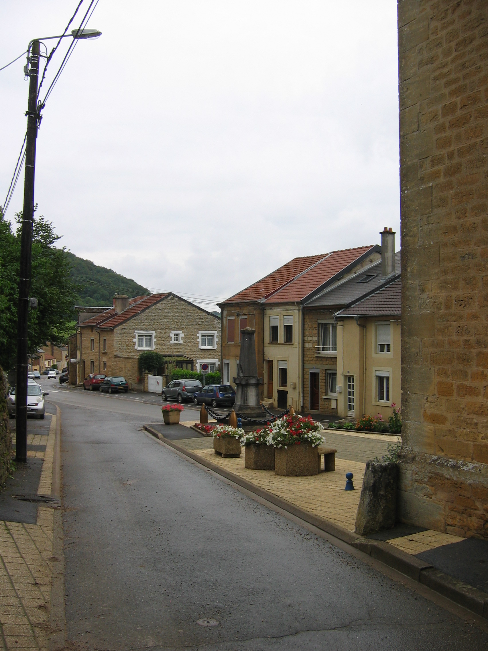 village Angecourt Ardennes France